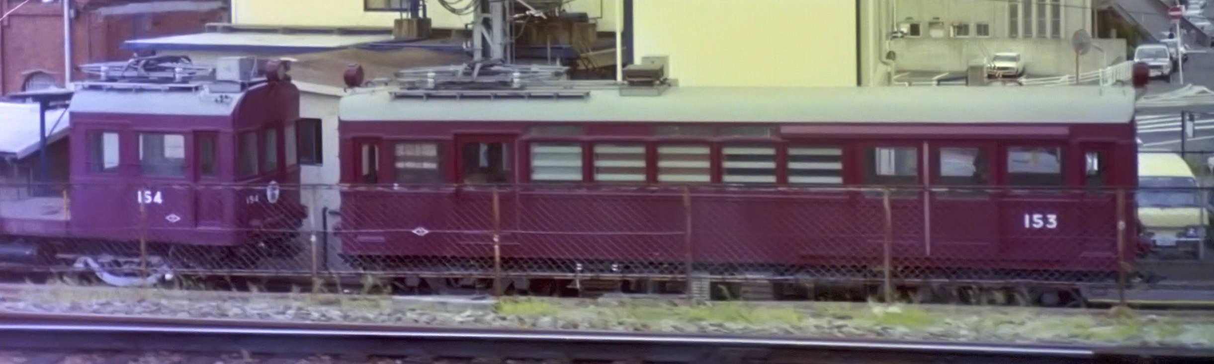 阪神電気鉄道 153 1984年